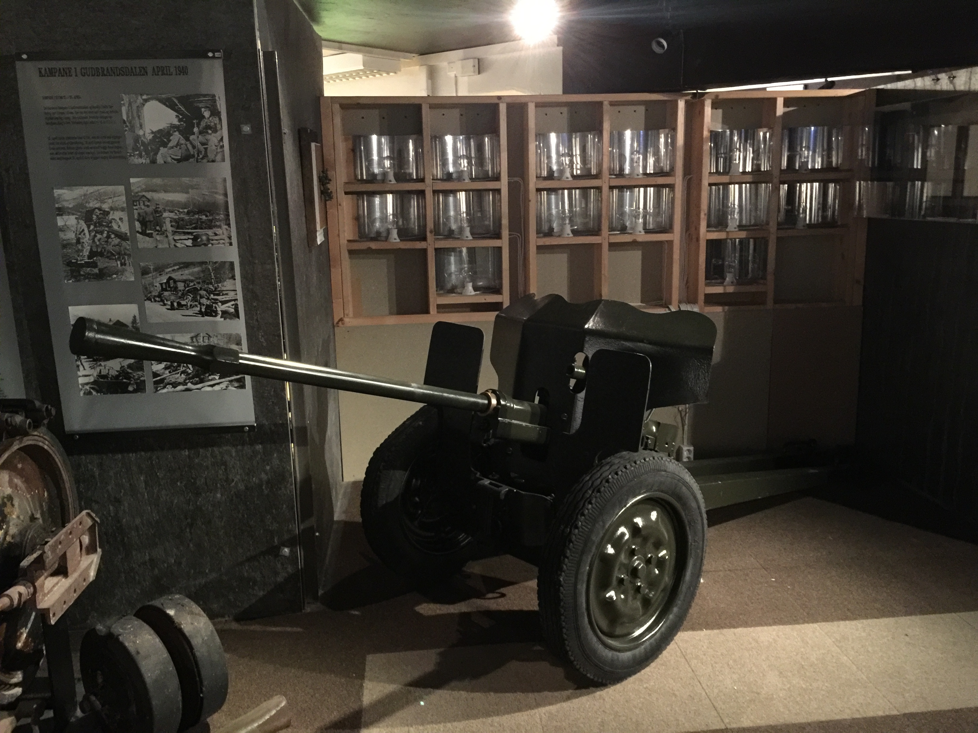 25 mm Hotchkiss bevart med Gudbrandsdal Krigsminnesamling